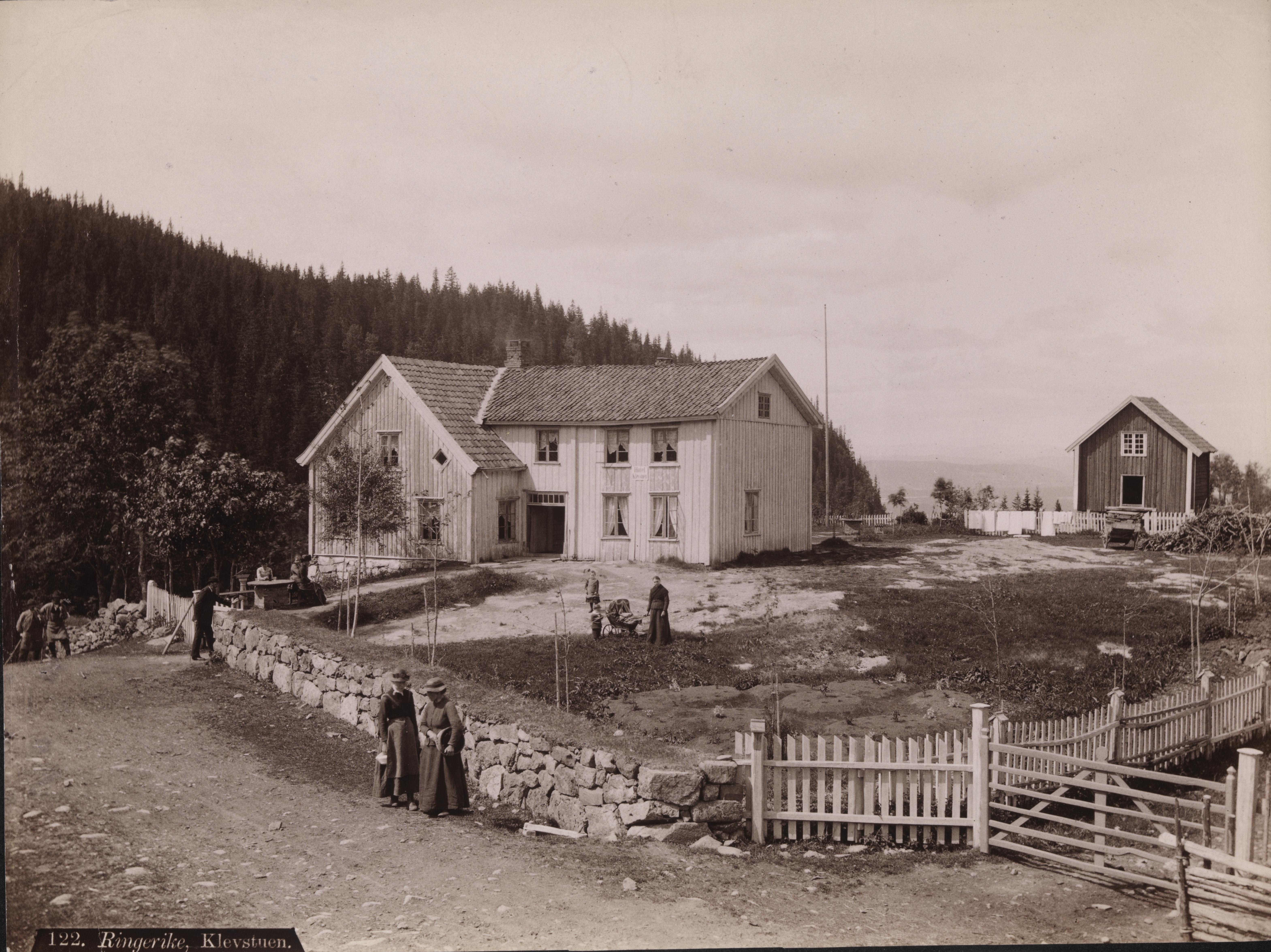 Sted: Kleivstua Kommune: Hole Fylke: Buskerud Tagger: Hotel Klevstuen. bygninger hoteller hus arkitekturfotografi landskapsfotografi